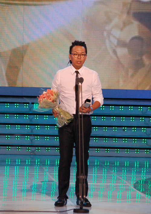 MBC PD 김태호